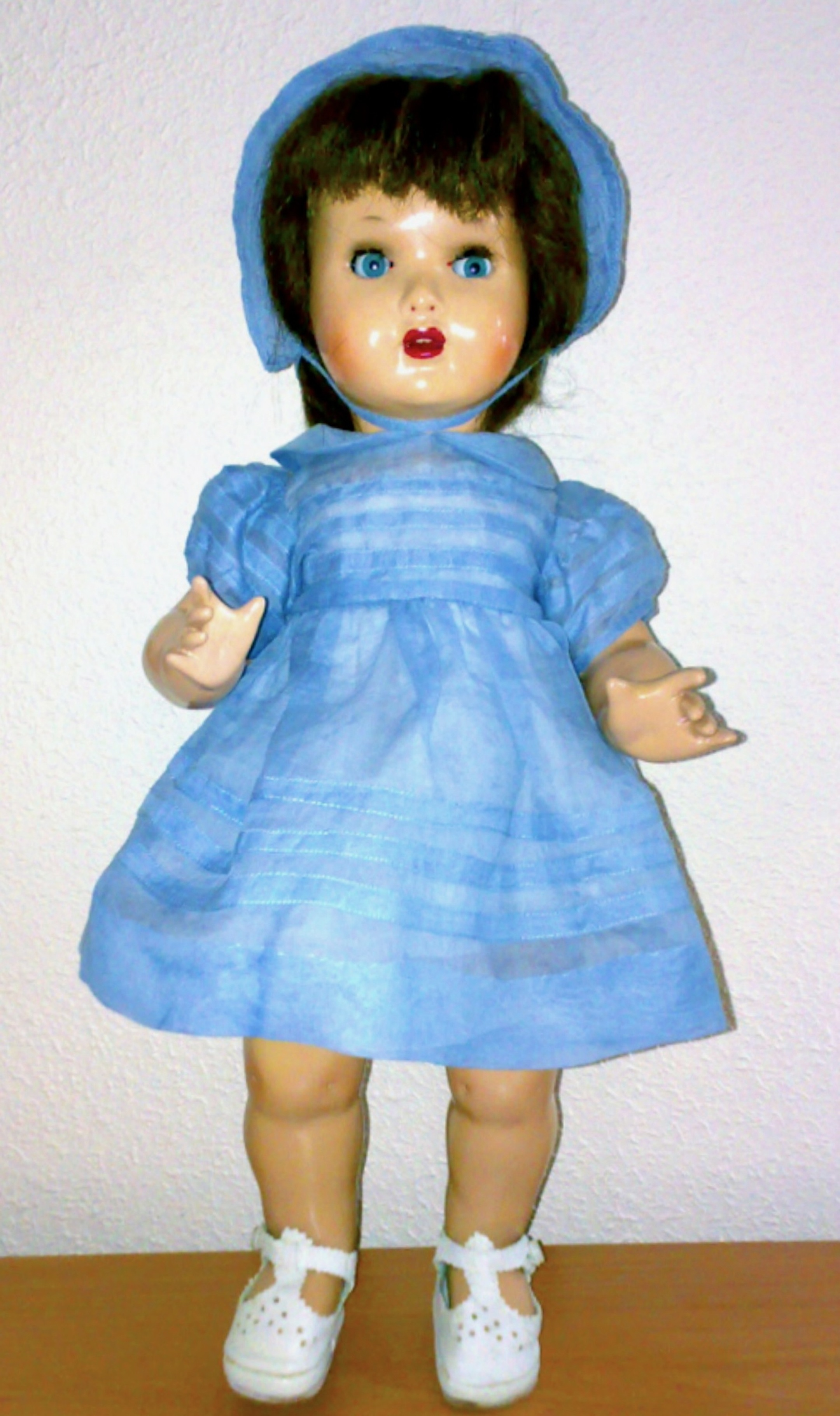 Mariquita Pérez. Muñeca de cartón piedra con pelo corto con flequillo y ojos azules durmientes. Pintura al duco. Altura= 46 cm. Período 1954-1958. Madrid. Muñecas Florido. Cabello castaño corto. Los ojos son azules, durmientes. Las cejas están trazadas con aerógrafo, las pestañas inferiores están pintadas a trazo y las superiores son naturales, con los lagrimales y orificios nasales señalados con un puntito rojo; la boca la tiene abierta y muestra dos dientes superiores. Tiene orejas. En la barbilla y rodillas presenta unas hendiduras a modo de hoyuelos. Mueve la cabeza, los brazos y las piernas. La manos abiertas y sin modelar. Vestido confeccionado en organdí (con apresto y ligamento tafetán) de color azul con capota a juego. Cuello vuelto redondo, mangas cortas de tipo farol. Bies del mismo tejido en el borde y adornadas por tres bandas estrechas, del mismo tejido, aplicadas sobre el tejido base mediante unos pespuntes mecánicos en hilo azul. Corte a la altura del pecho. Falda fruncida. El cuerpo y la falda se guarnecen con las mismas bandas decorativas de las mangas. En el cuerpo se disponen en el centro, coincidiendo con las mangas y en la falda en las proximidades del bajo. Abierto parcialmente en la espalda, se cierra con tres botones forrados del mismo tejido y tres presillas de hilo. Ropa interior compuesta por combinación y braga de algodón. En este cuarto modelo de la muñeca de cartón piedra el cuerpo es mas estilizado y no lleva marca posterior alguna, no así las realizadas en los talleres de Nuñez de Balboa, por lo que esta pieza fue realizada por Muñecas Florido.